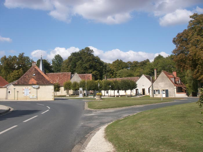 Centre bourg de Villegongis, commune de l'Indre (36), avec la mairie, la salle des fêtes, l'église, le puits, et l'auberge.